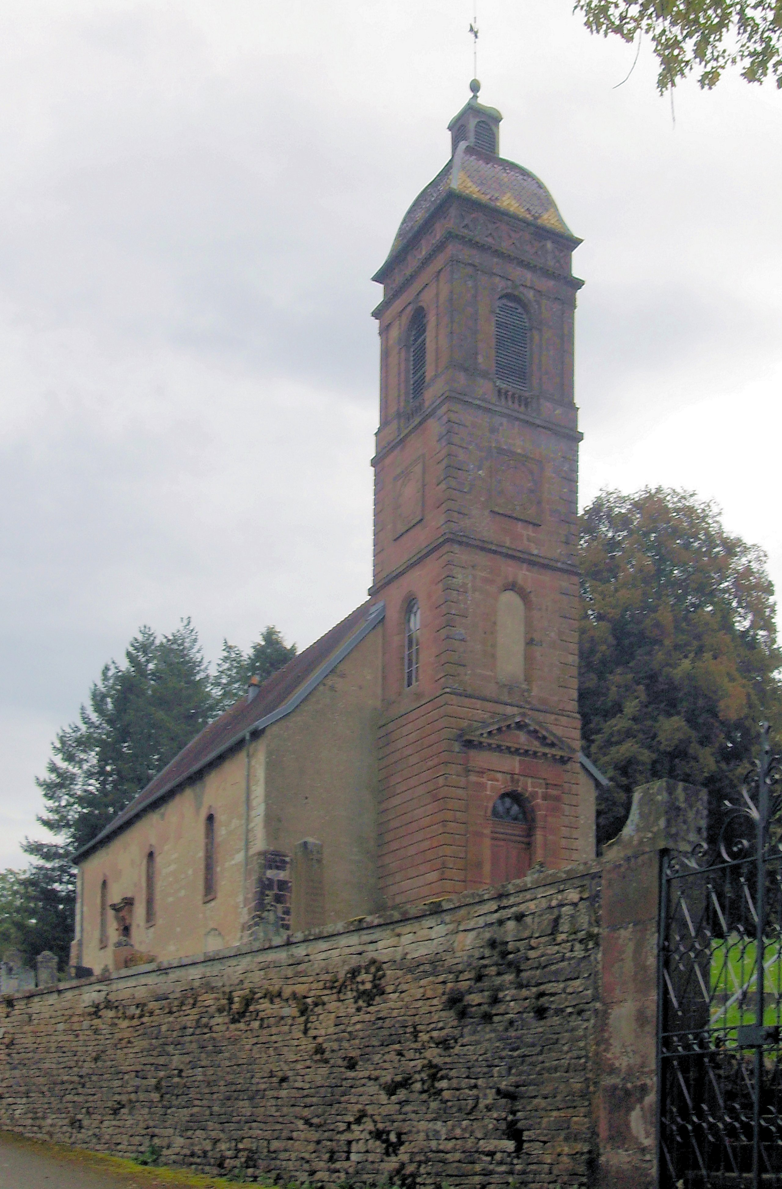 Temple protestant de Saint-Julien-lès-Montbéliard